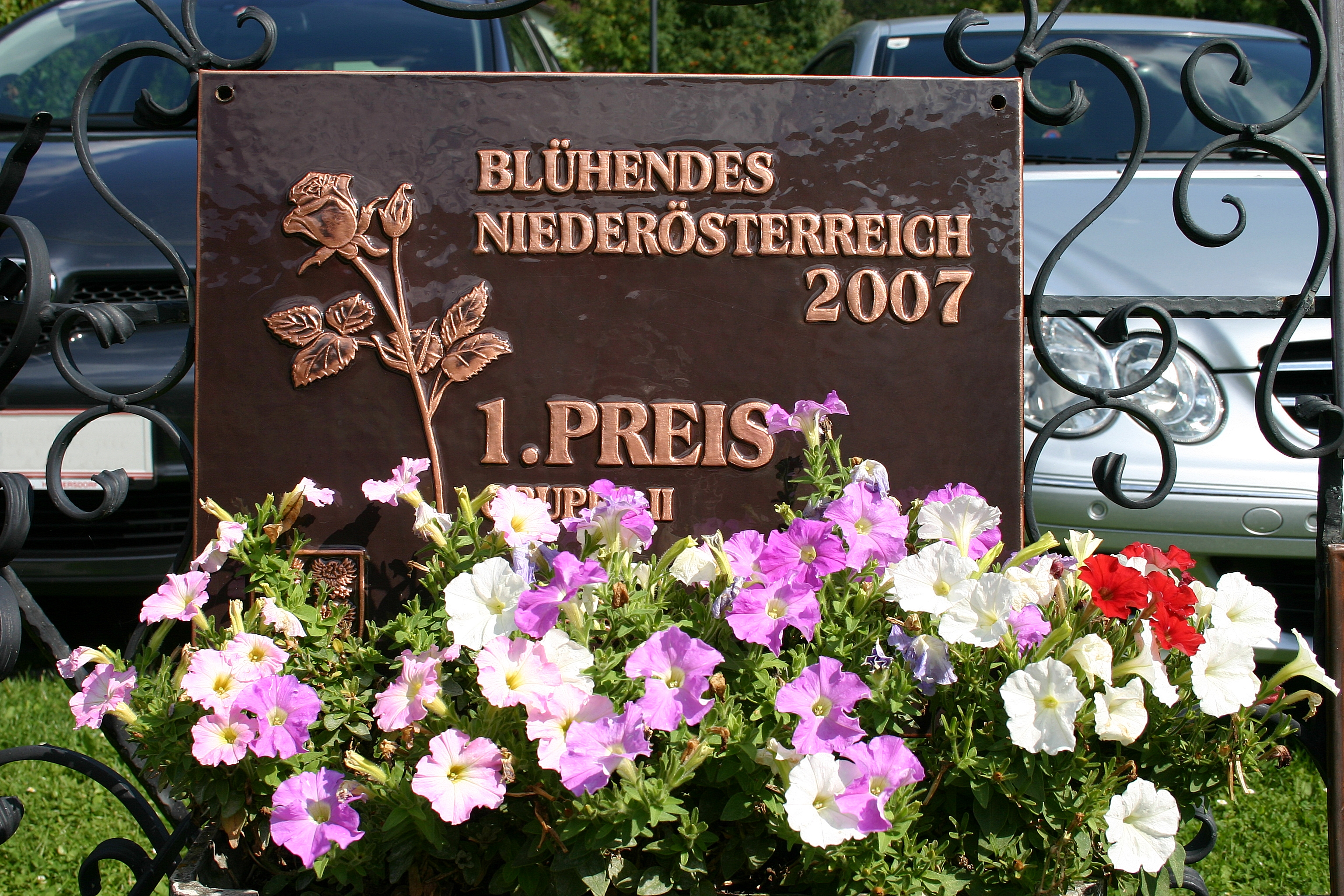 Puchberg am Schneeberg Sieger im Blumenschmuckwettbewerb 2007